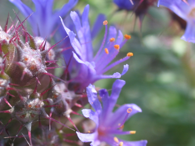 Pablo Alberto Salguero Quiles